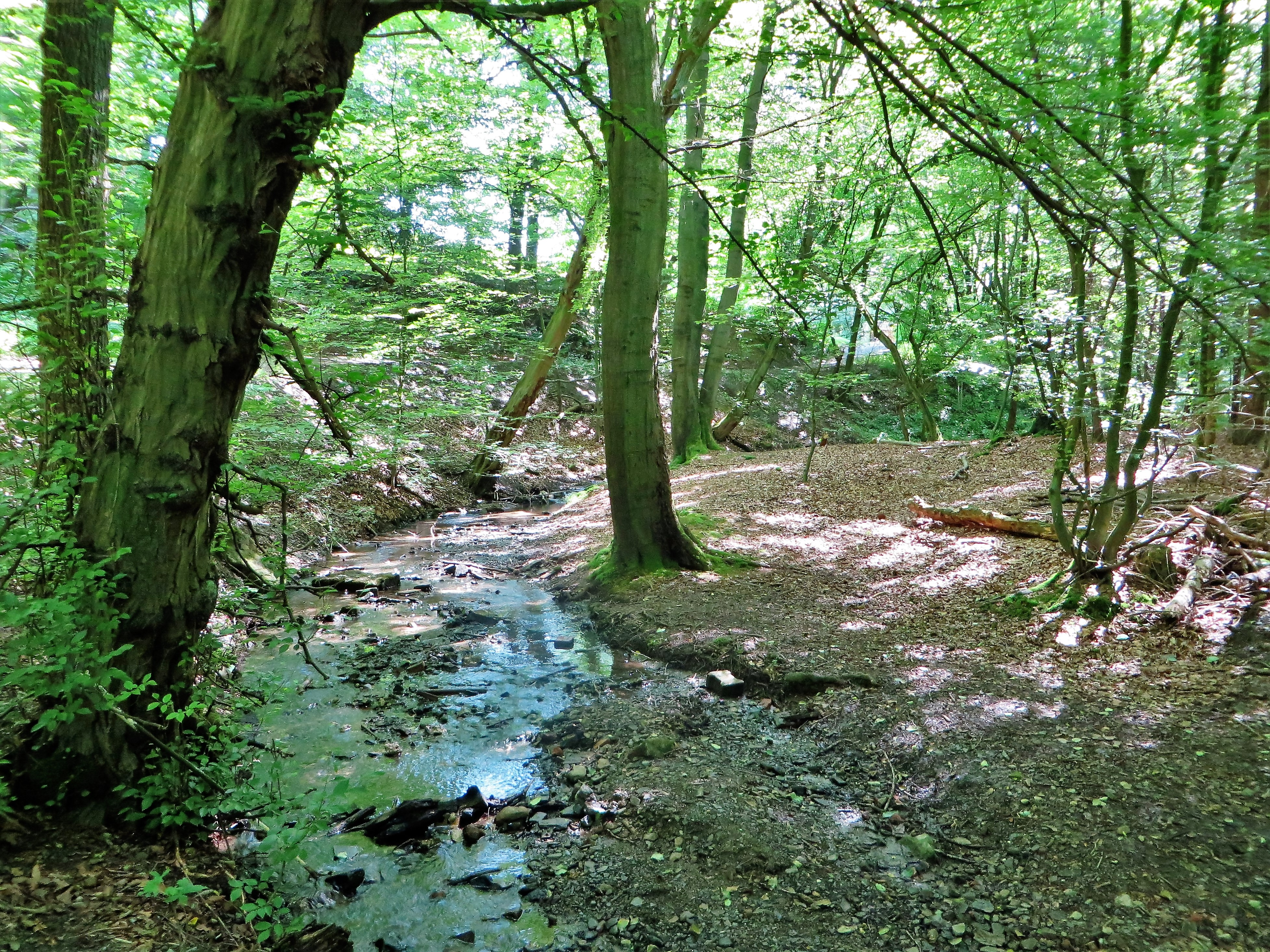 Naturschutzgebiet EN-015 „Oberes Felderbachtal“ in Sprockhövel. Das Gebiet zwischen Mollenkotten im Süden und Gennebreck-Mühle im Norden, wird westlich von dem Waldgebiet Hilgenpütt begrenzt. Der Felderbach entspringt bei Mollenkotten und fließt mit begleitenden Nassbrachen und Teichen durch dieses bewaldete Schutzgebiet.